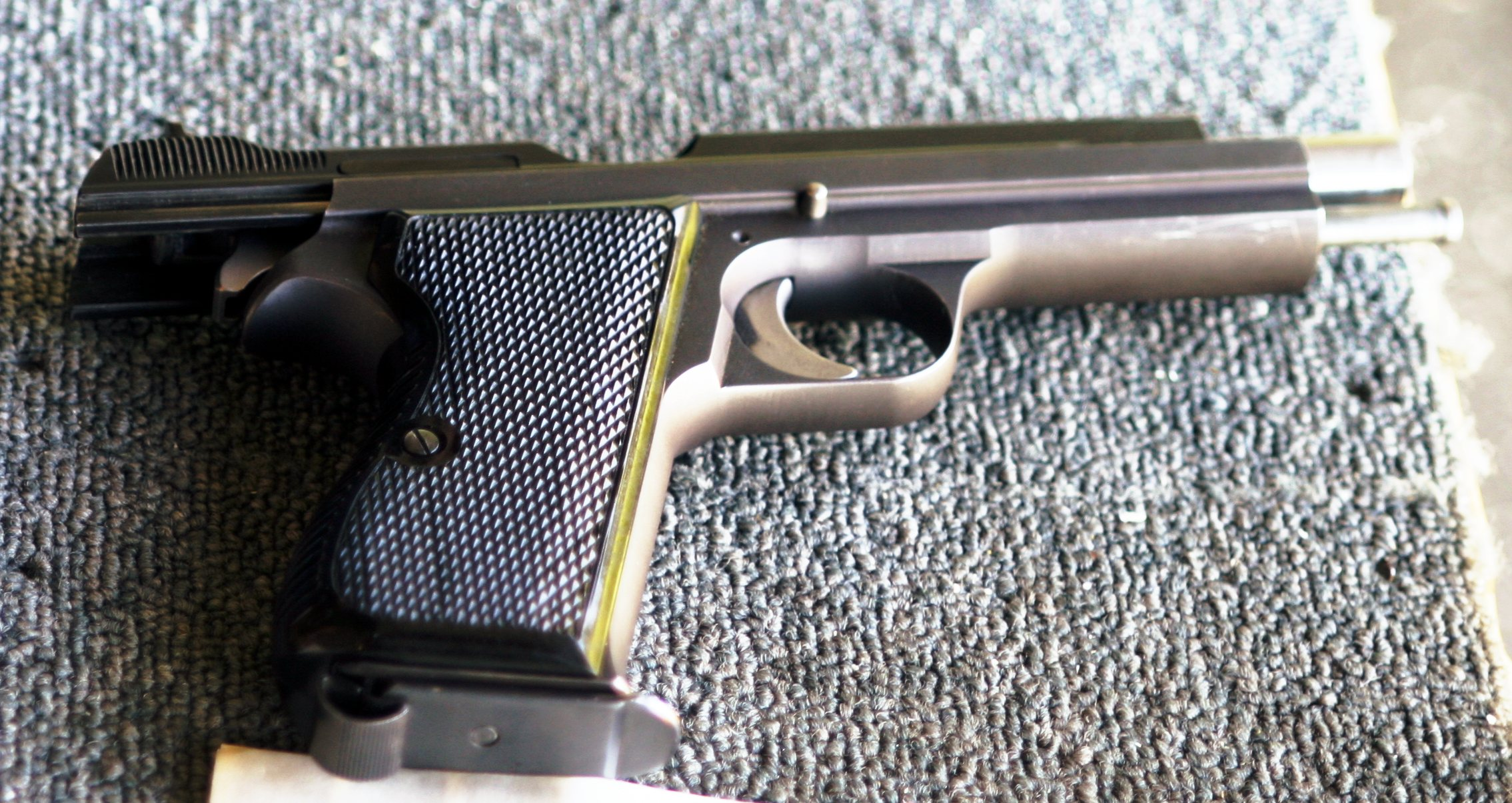 SIG-210